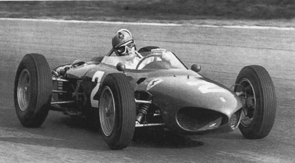 Il pilota automobilistico italiano Giancarlo Baghetti su Ferrari 156 F1 al Gran Premio d'Italia 1962. Licensing Baghetti, Giancarlo, 1962 Baghetti, Giancarlo, 1962 Ferrari 156 F1 1962